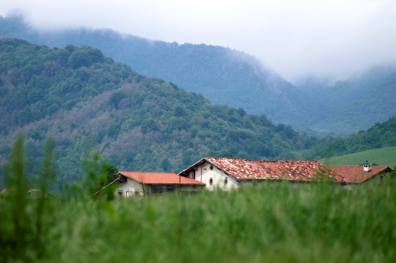 arraitz-orkin (ultzama)